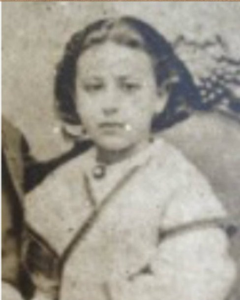 Hija de Juan Manuel Canaveris y Carmen Gutiérrez Moreno